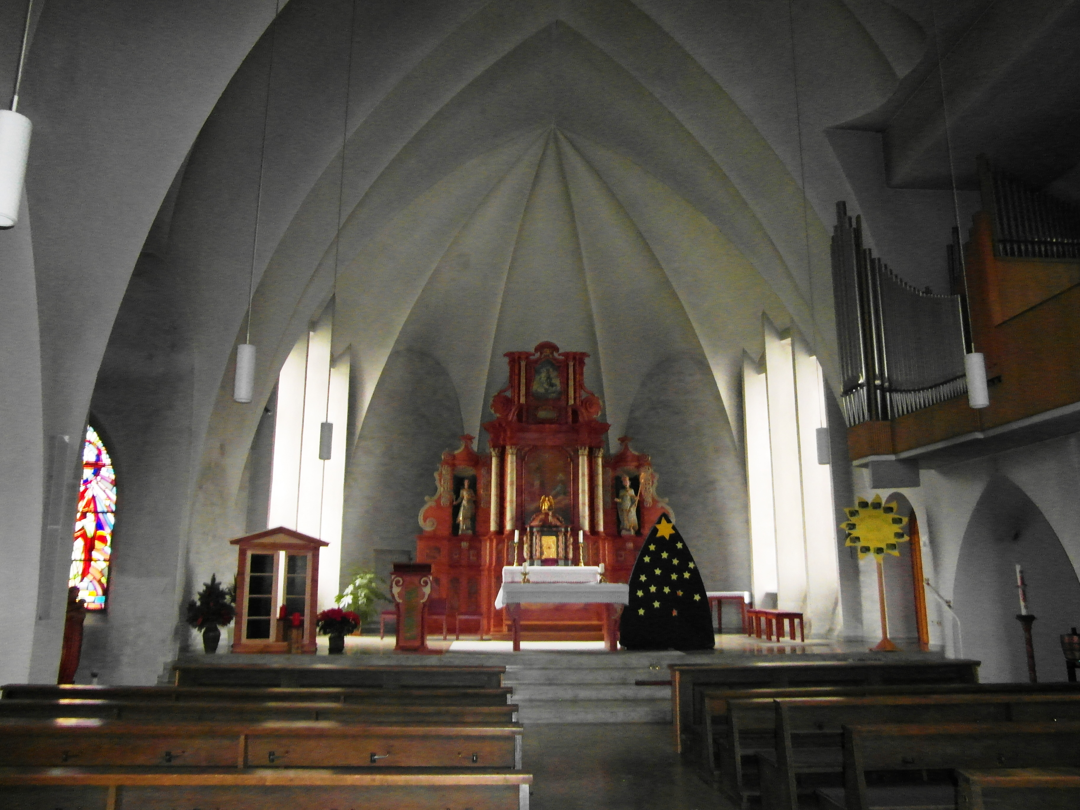 Altarraum St. Nikoilaus in Cobbenrode